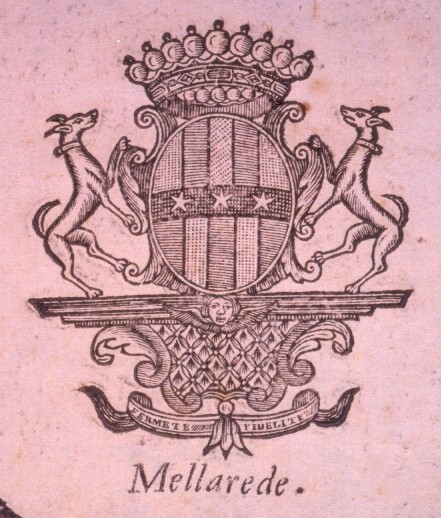 Cet ex-libris est constitué du blason de l’abbé Amédée Philibert de Mellarède, comte de Bettonet (1682–1780). Cet ex-libris se trouve sur les ouvrages légués aux bibliothèques municipales de Chambéry en 1780 par l’abbé de Mellarède.